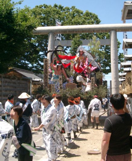 土崎神明社祭の曳山行事の写真